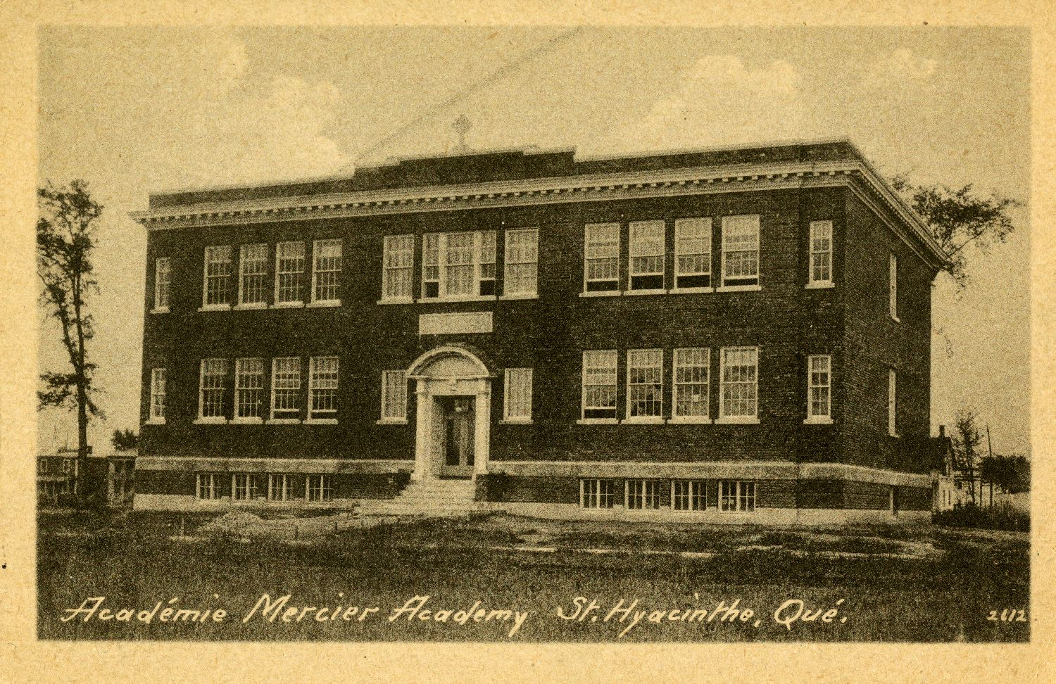 Information added by Wikimedia users.Académie Mercier, dite aussi École Mercier à Saint-Hyacinthe, construire par l'architecte René Mercier en 1917